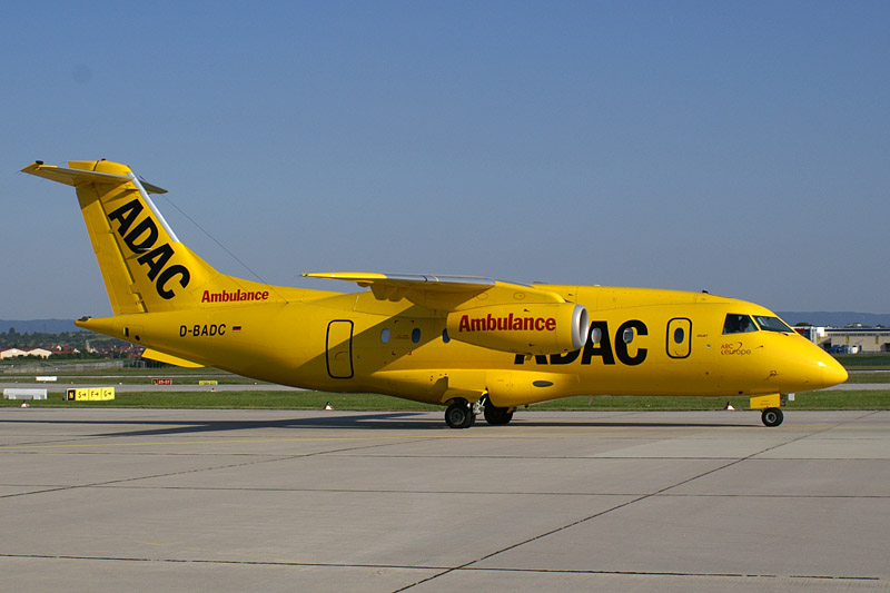 ADAC Dornier 328-300 D-BADC